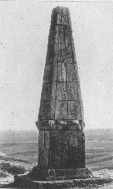 Arapiles (Salamanca) - España Turística y Monumental / Cuarto álbum / Las Bellezas de Castilla / Región Leonesa - Cromo 50 x 70 Sepia